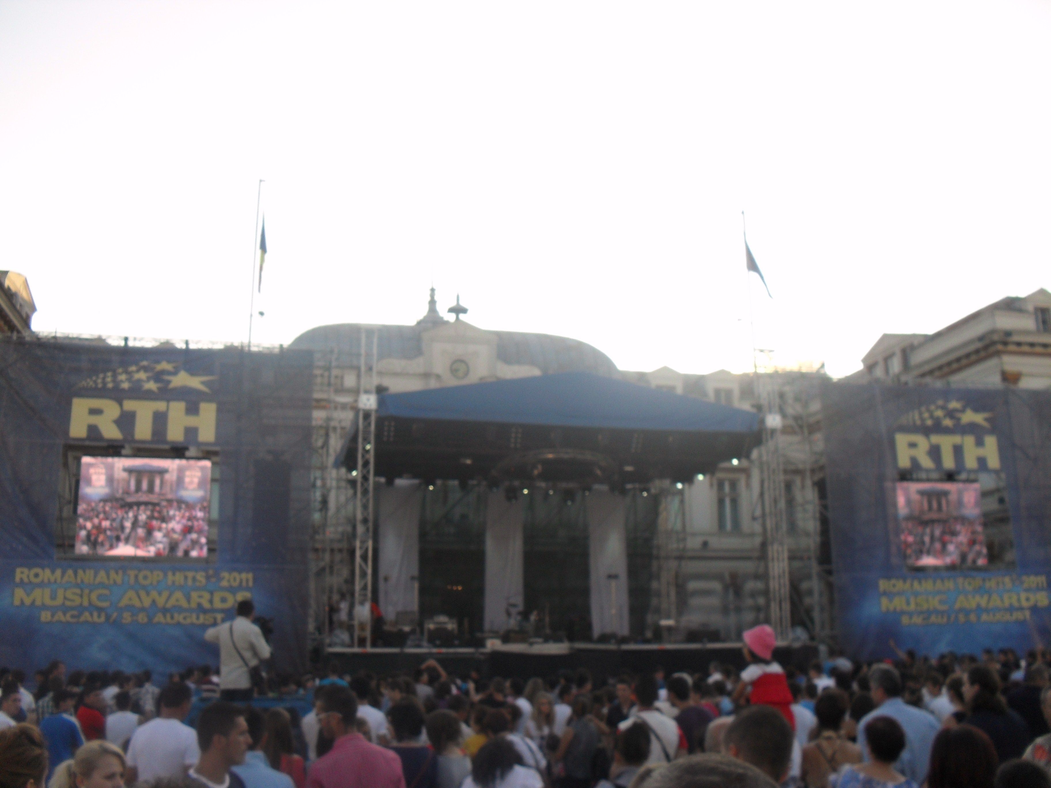 Romanian Top Hits - Music Awards (Bacau 5-6 August 2011)